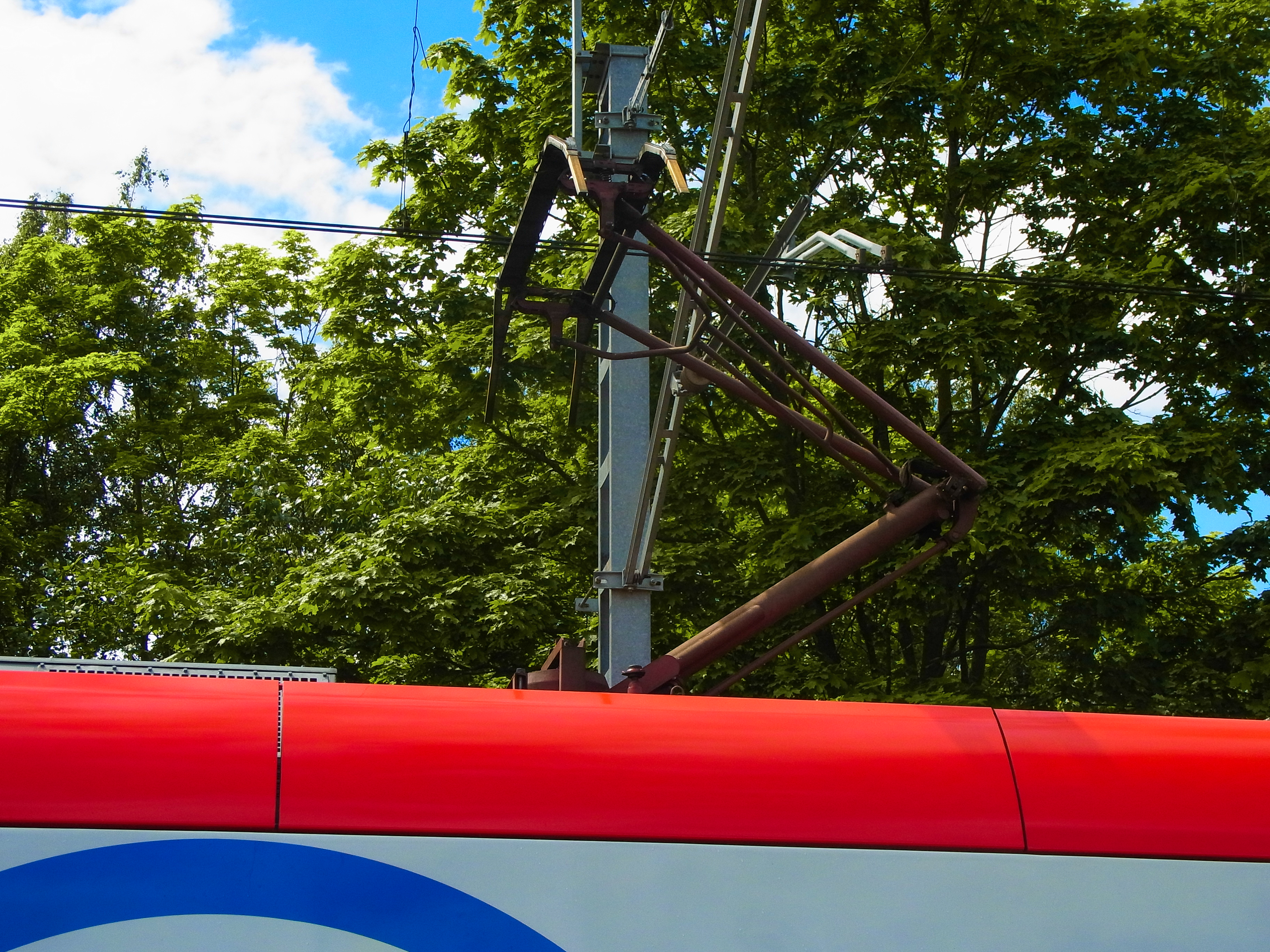 Пантограф электропоезда ЭГ2Тв-002